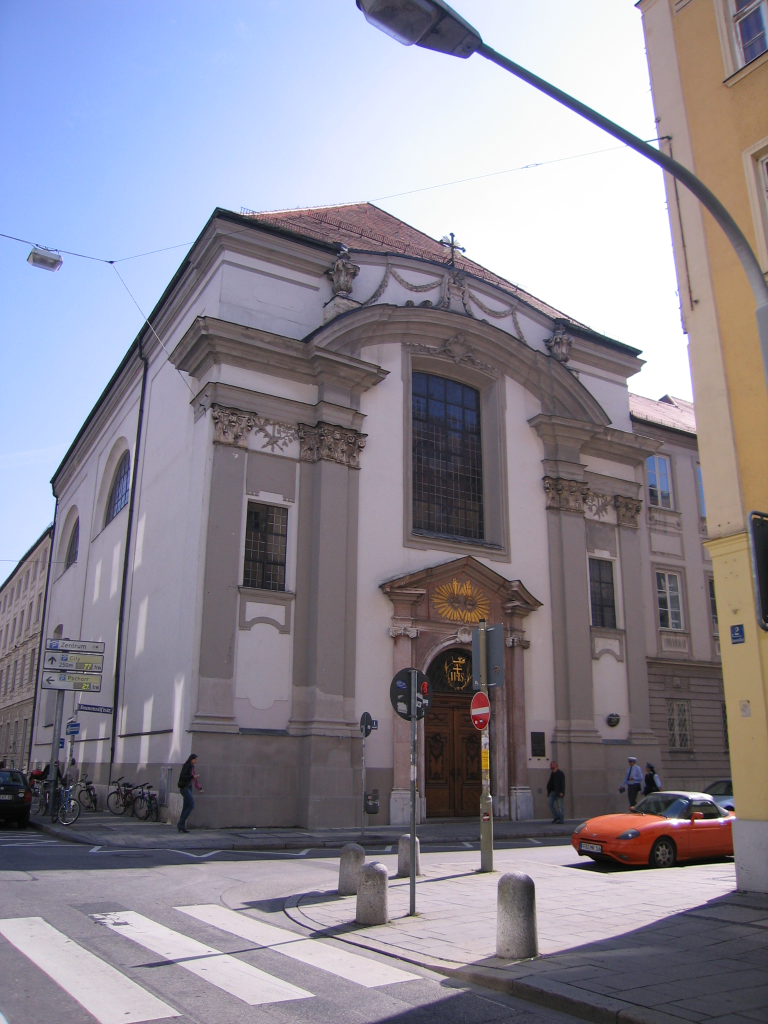 Damenstiftkirche St. Anna, Munich